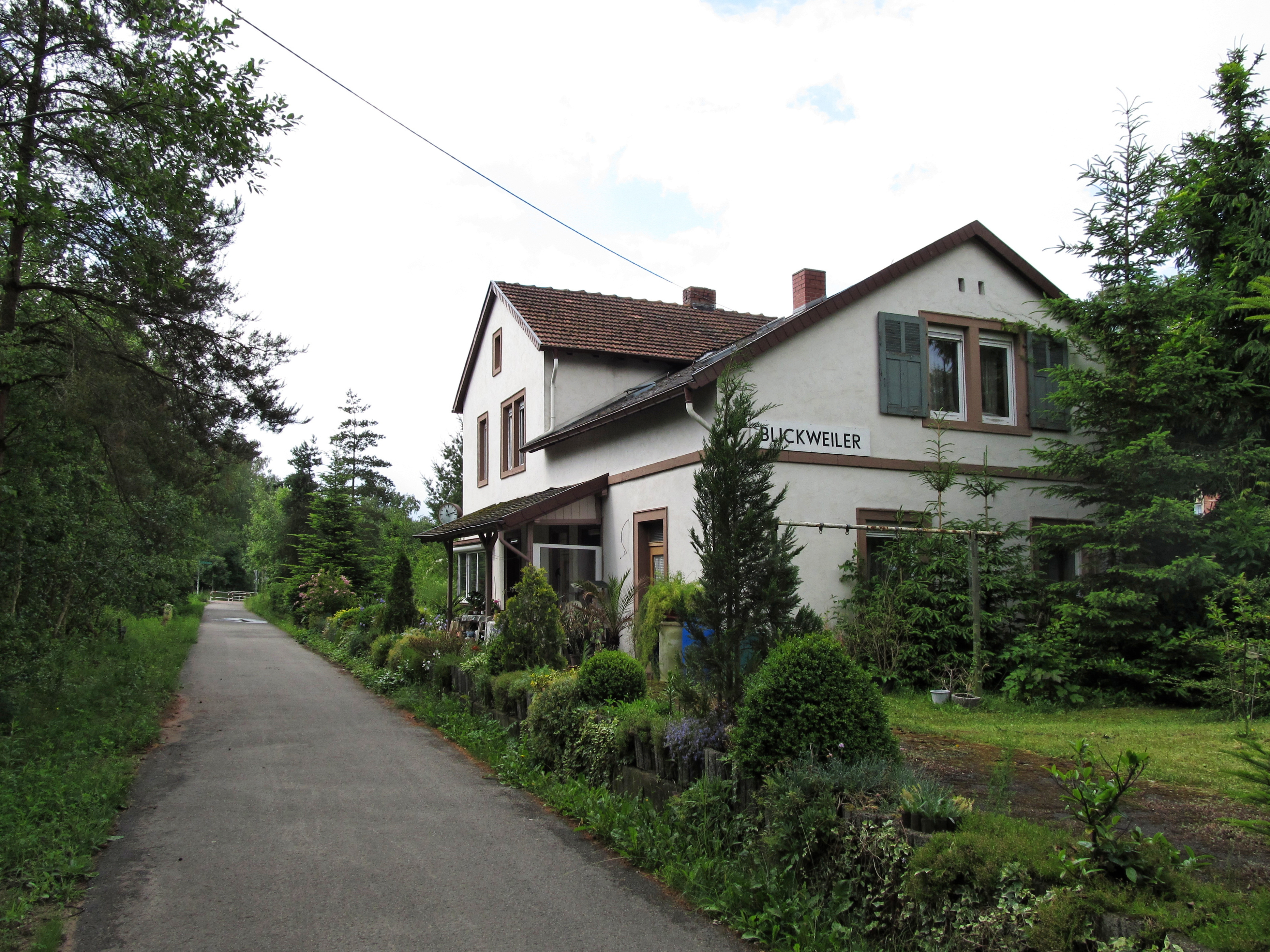 Das ehemalige Bahnhofsgebäude in Blickweiler, Saarland